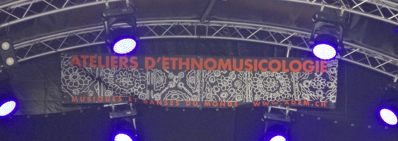 Fête de la musique le 25 juin 2017 à Genève : spectacle du groupe « France Varpet », musiques traditionnelles d’Arménie, sur la scène des Ateliers d'ethnomusicologie animée par Laurent Aubert, dans la Cour des Casemates.